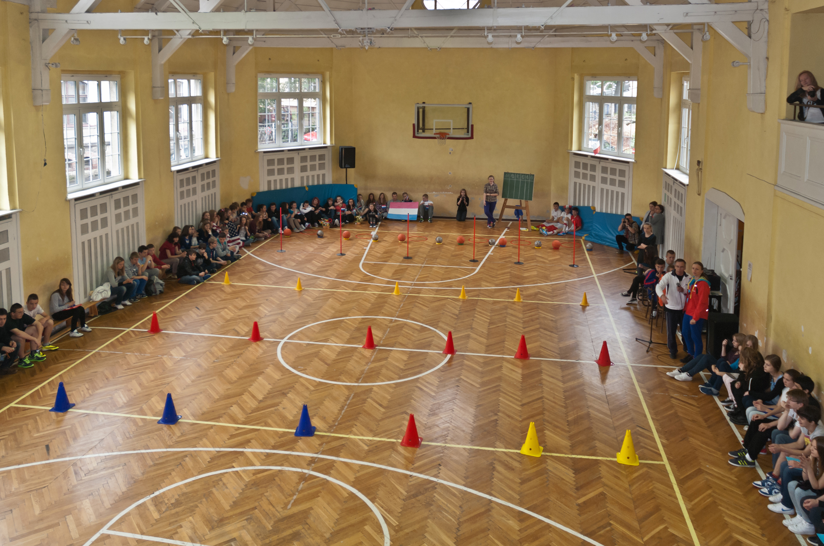 Zawody sportowe w sali gimnastycznej